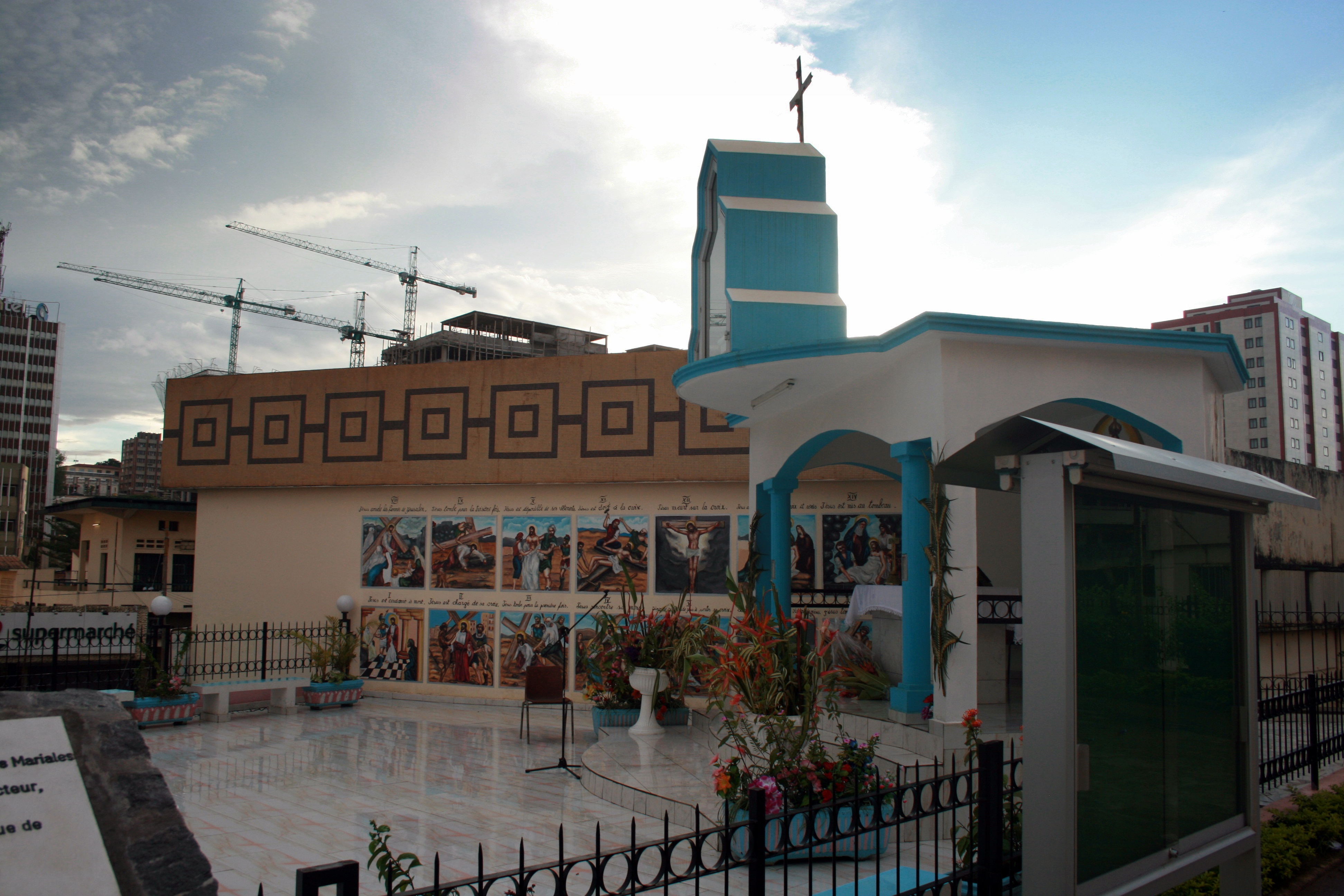 Cathédrale Notre Dame de Victoire de Yaoundé